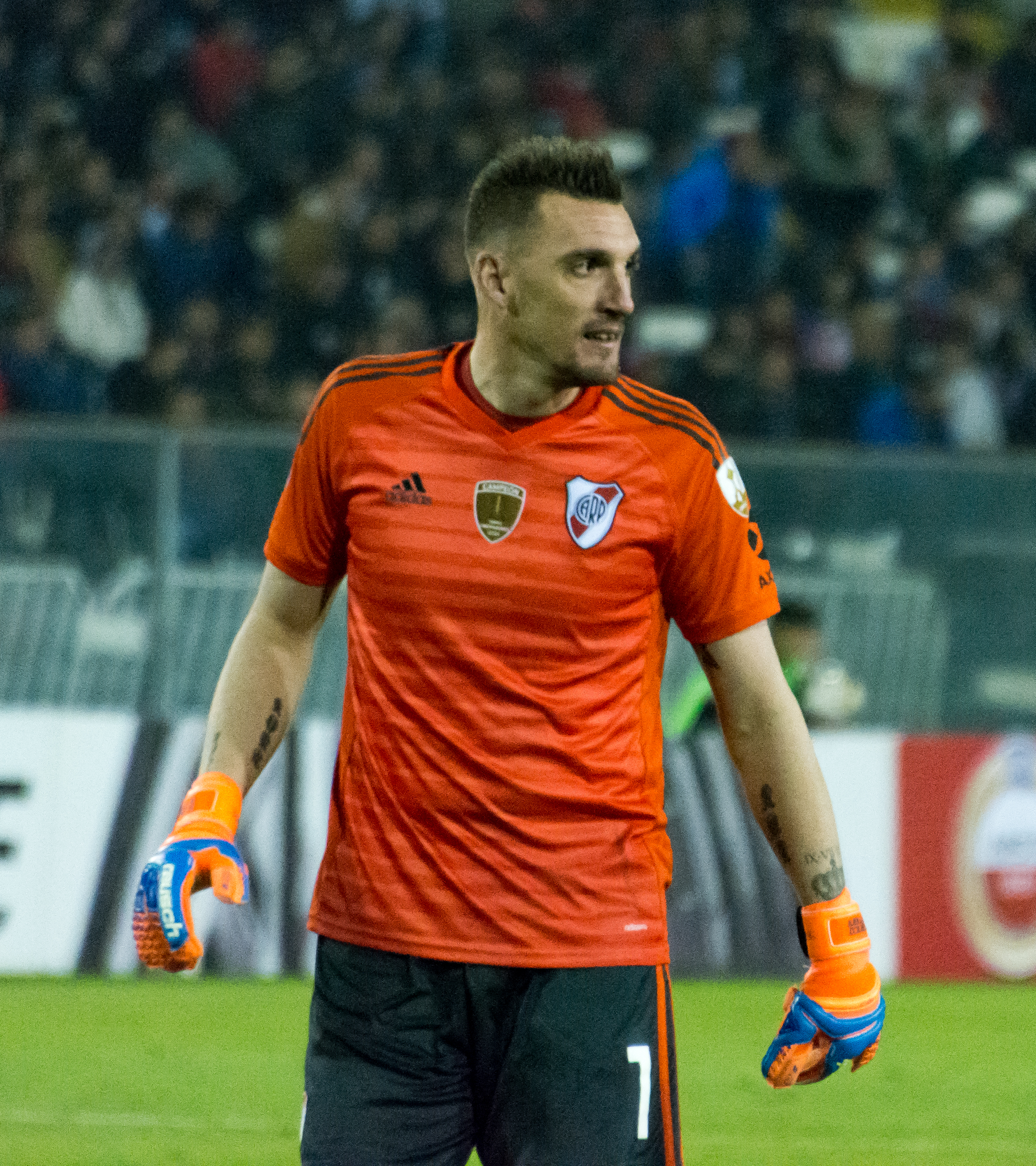 Palestino v River Plate, Estadio Monumental, Macul, Santiago, Región Metropolitana, Chile.